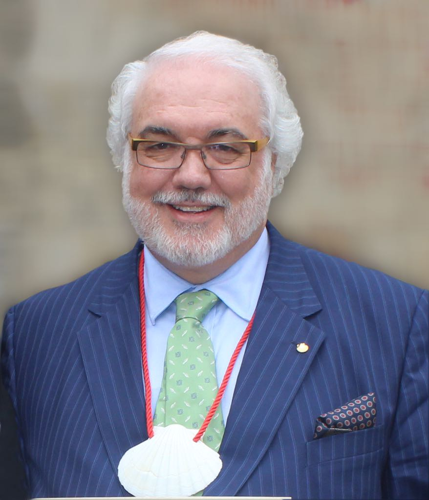 Carlos Vasallo